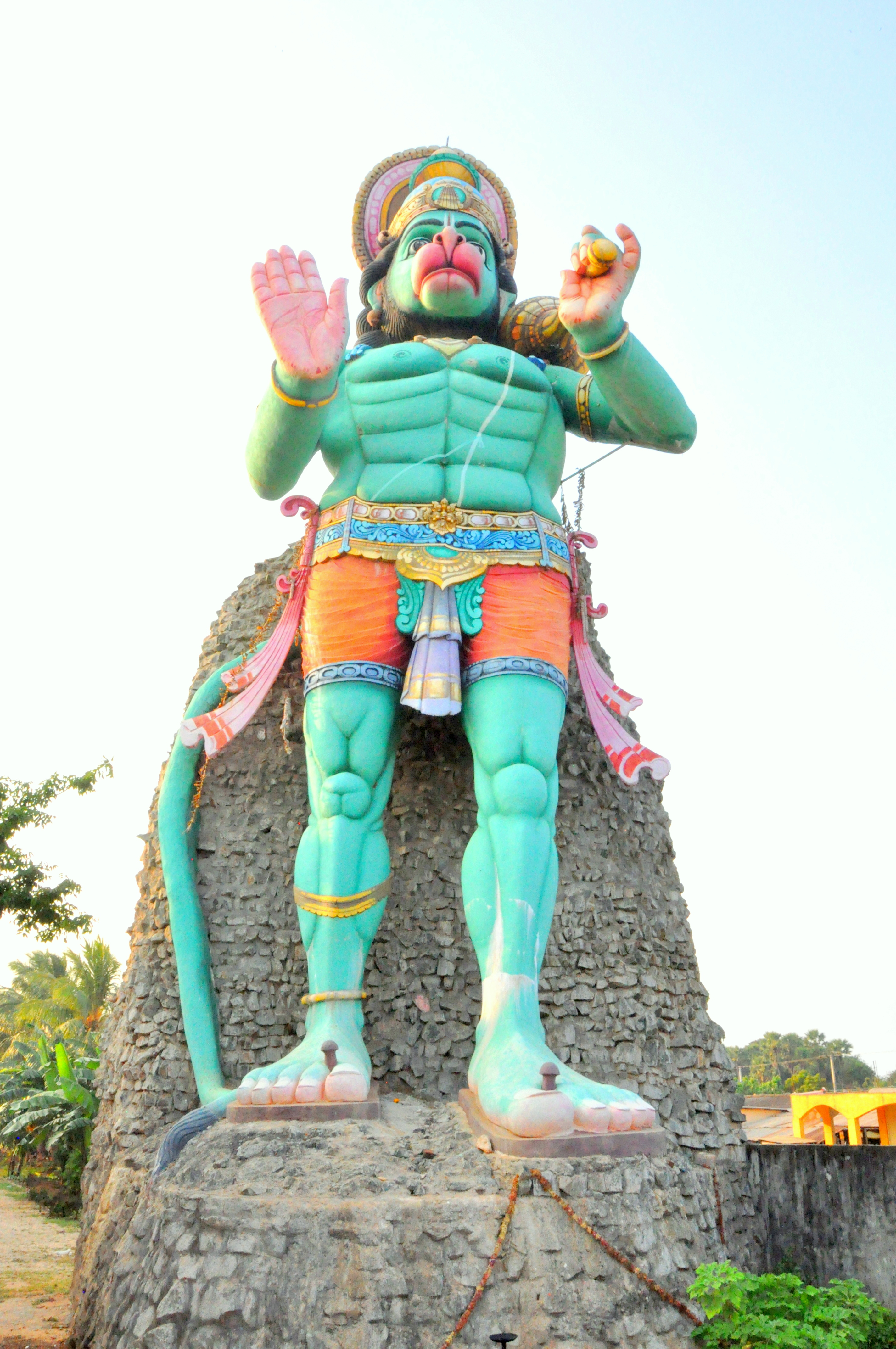 72 அடி உயர அனுமன் சிலை